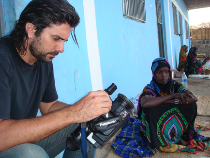 Hernán Zin en Etiopía, desierto Danakil, julio de 2007.